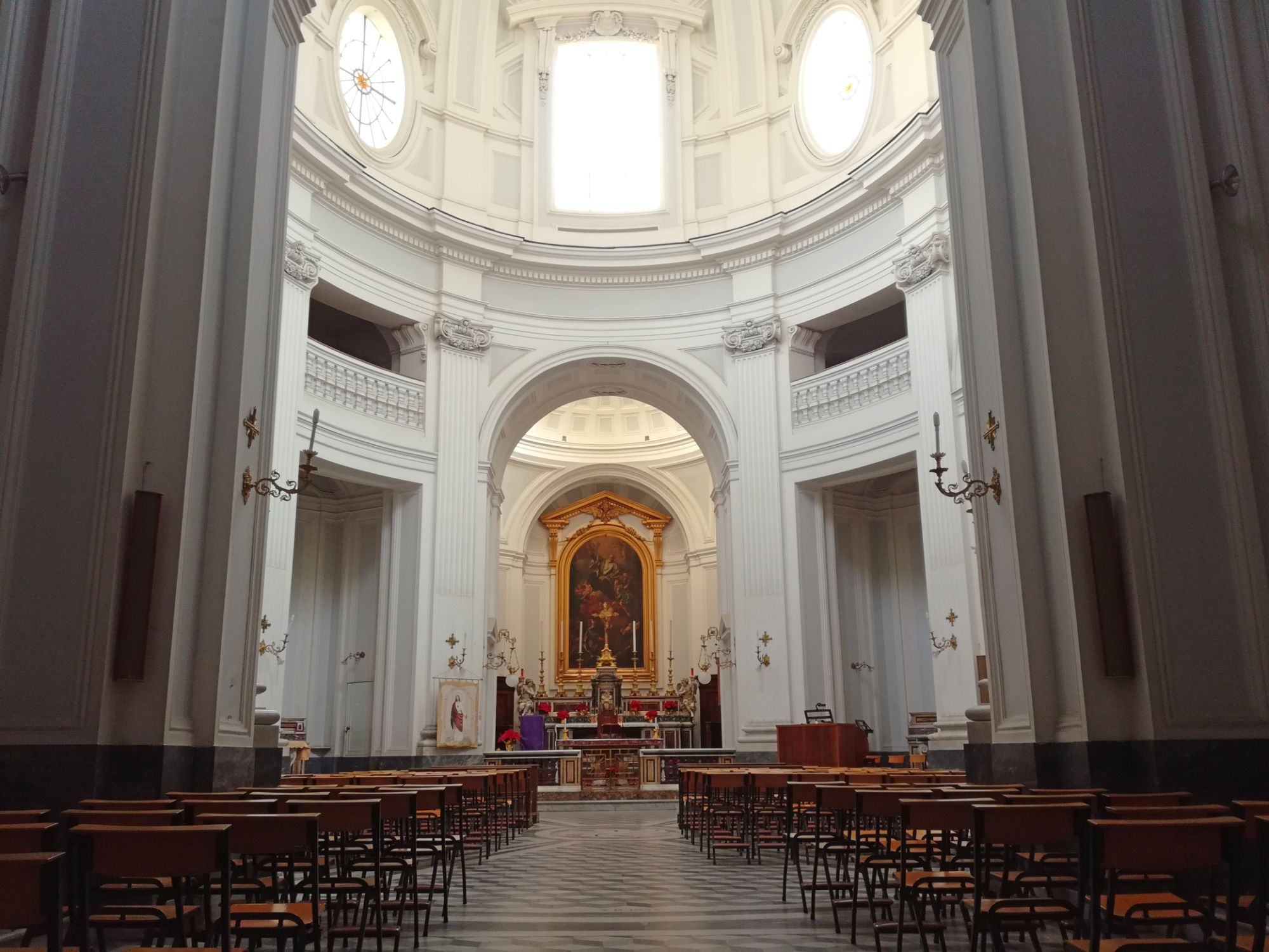 Altare, Missione dei Vergini (Napoli)